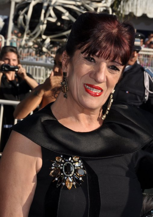 Biyouna au festival de Cannes